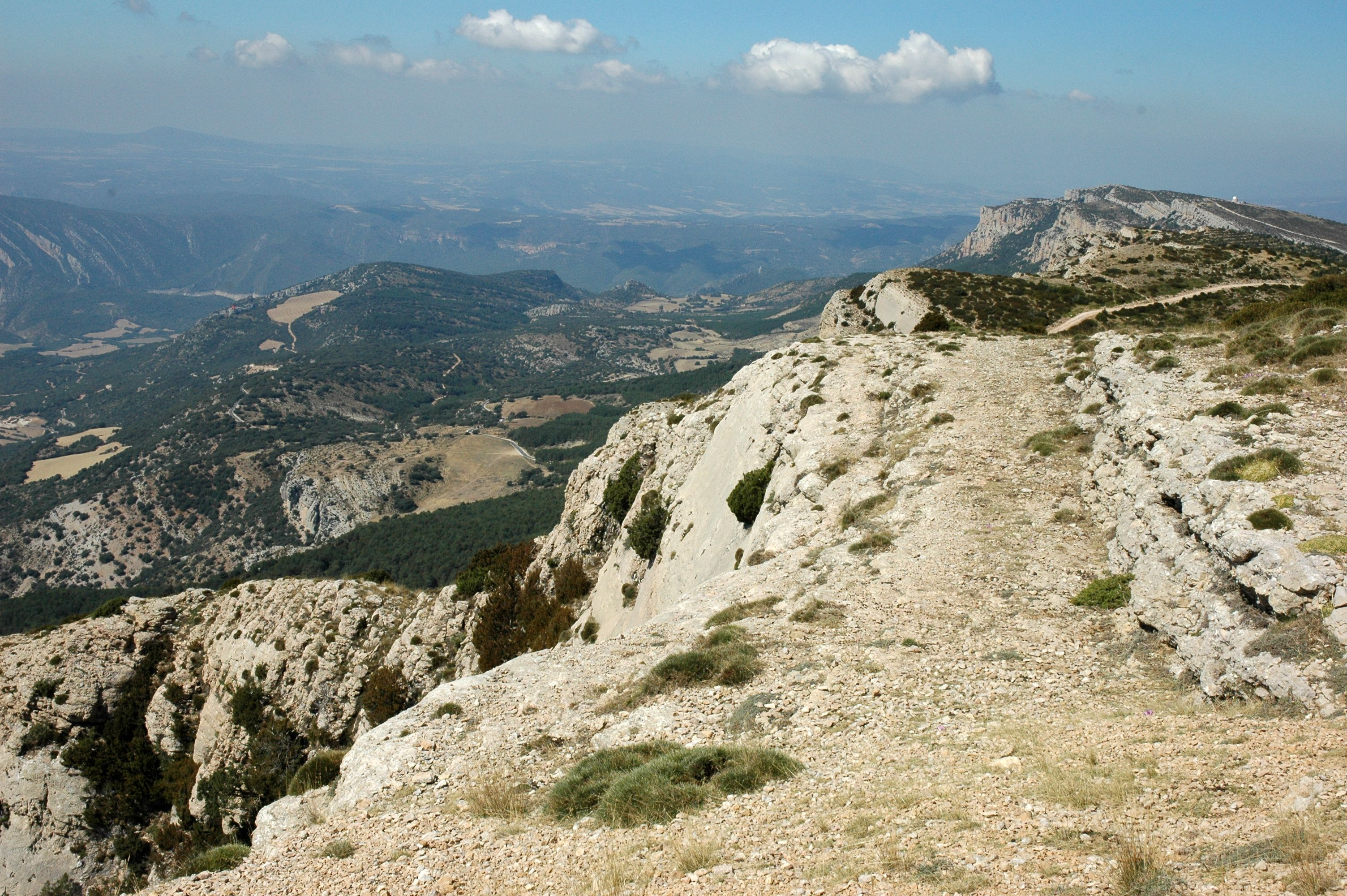 Sant Alís